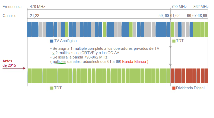 Transición Analógica/Digital de la TV Española.